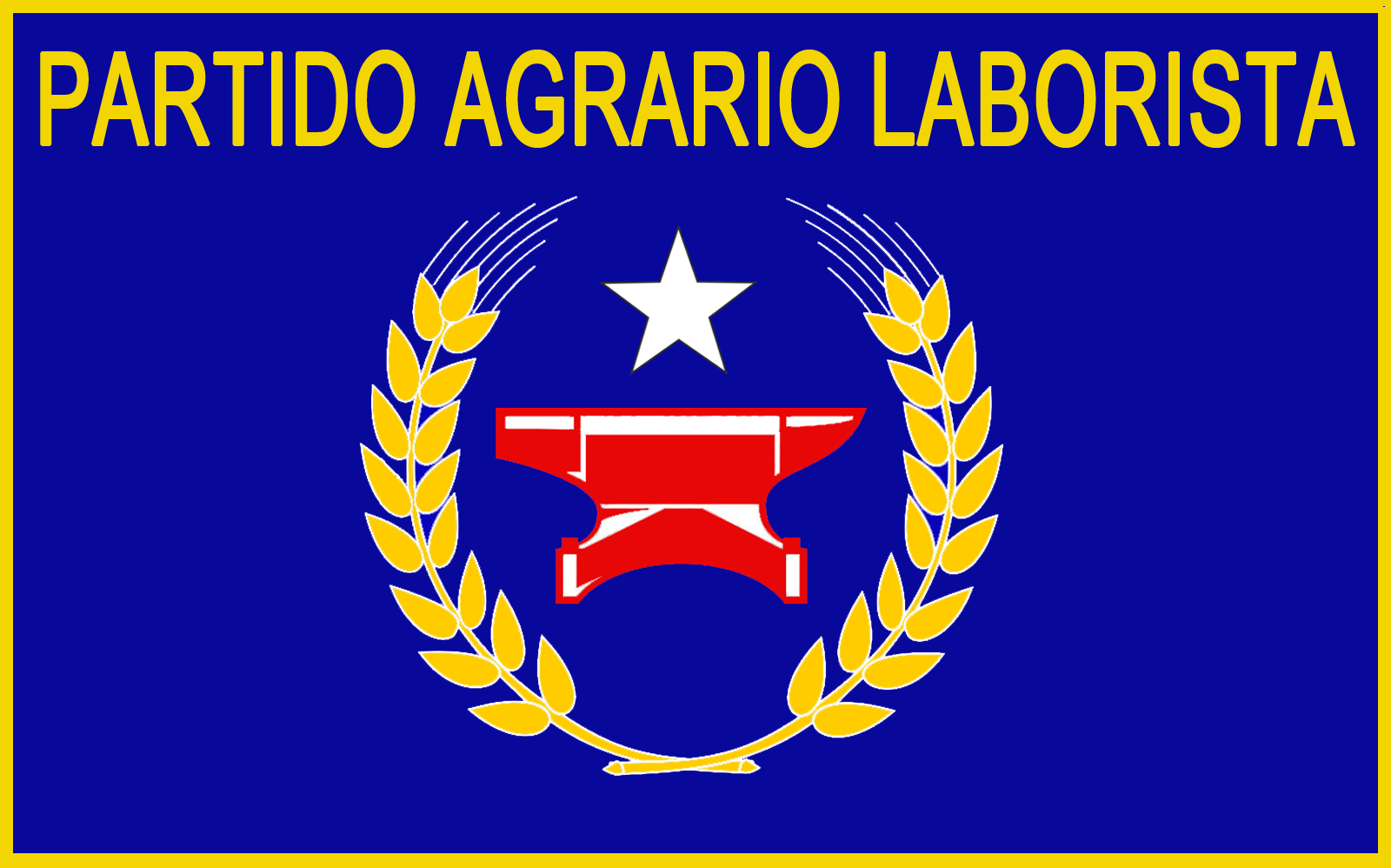 Bandera del Partido Agrario Laborista. según la imagen de constitución del Partido.